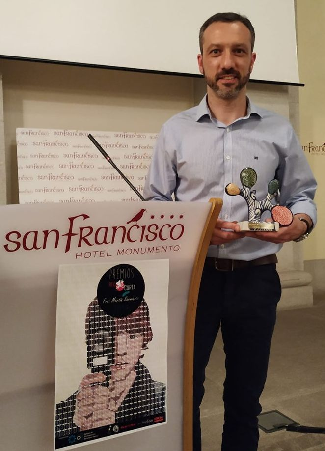 Lito Vila Baleato recolle o Premio Frei Martín Sarmiento, 3 de maio de 2019, Hotel San Francisco, Santiago de Compostela